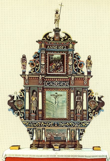 Horg kirke, altertavle